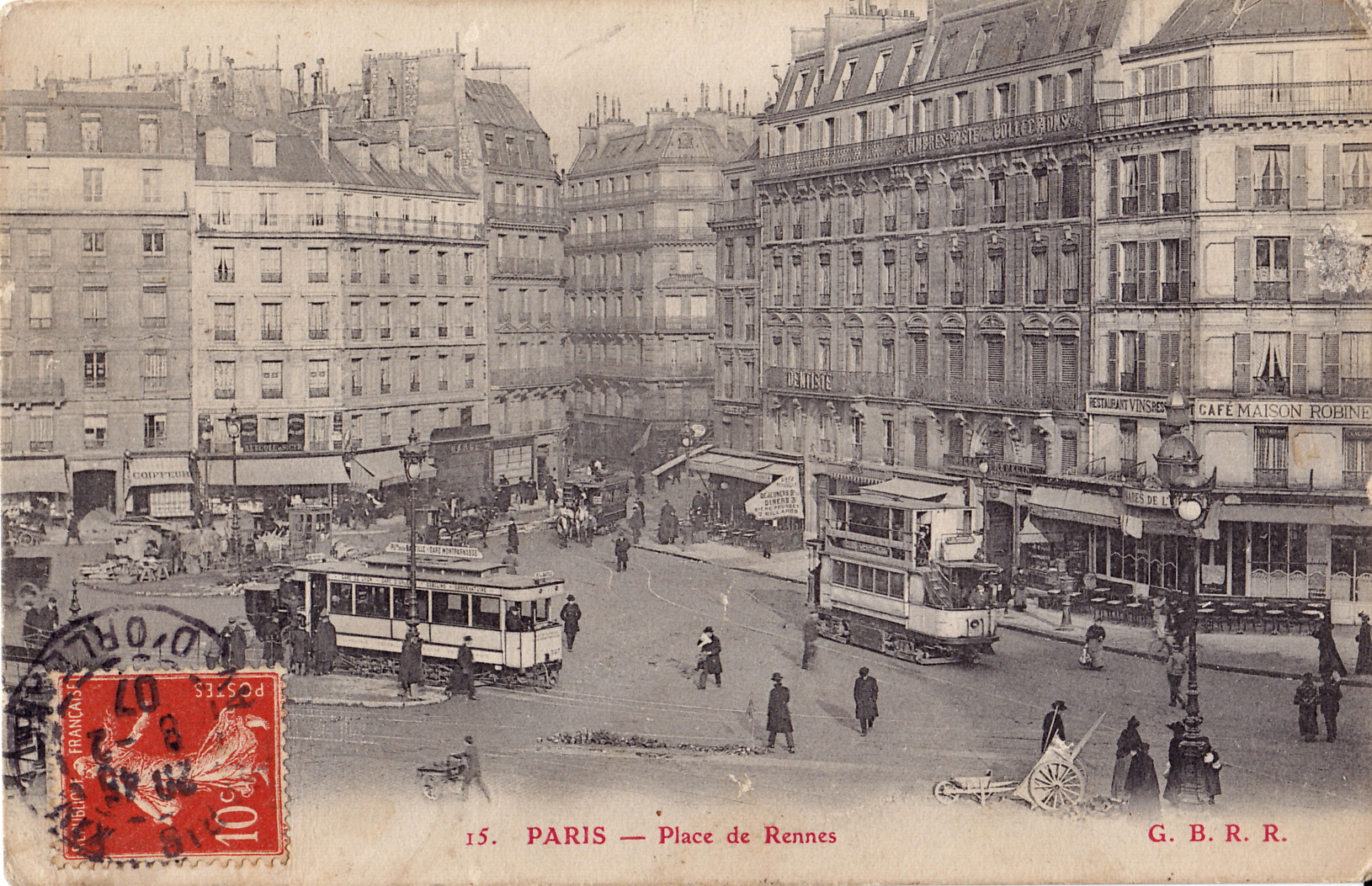 Carte postale ancienne éditée par G. B. R. R., n°15 : PARIS